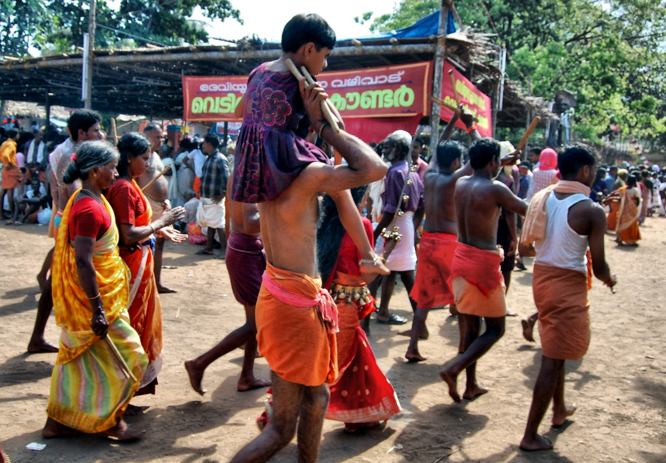 ഭരണിക്ക് കുടുംബത്തോടെ എത്തുന്നവർ.